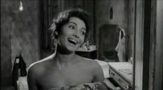 fotogramma da "la notte brava"